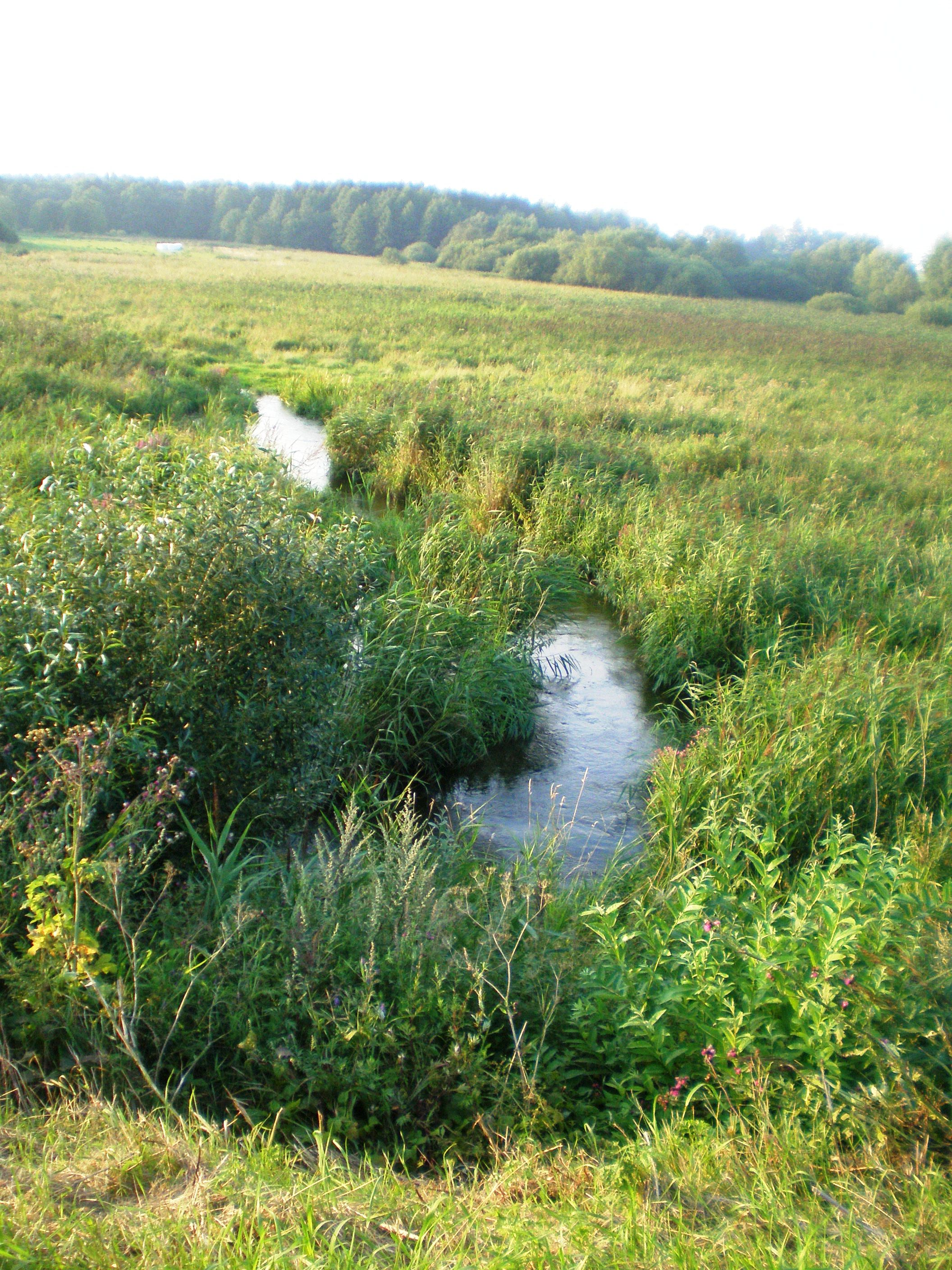 Upė river